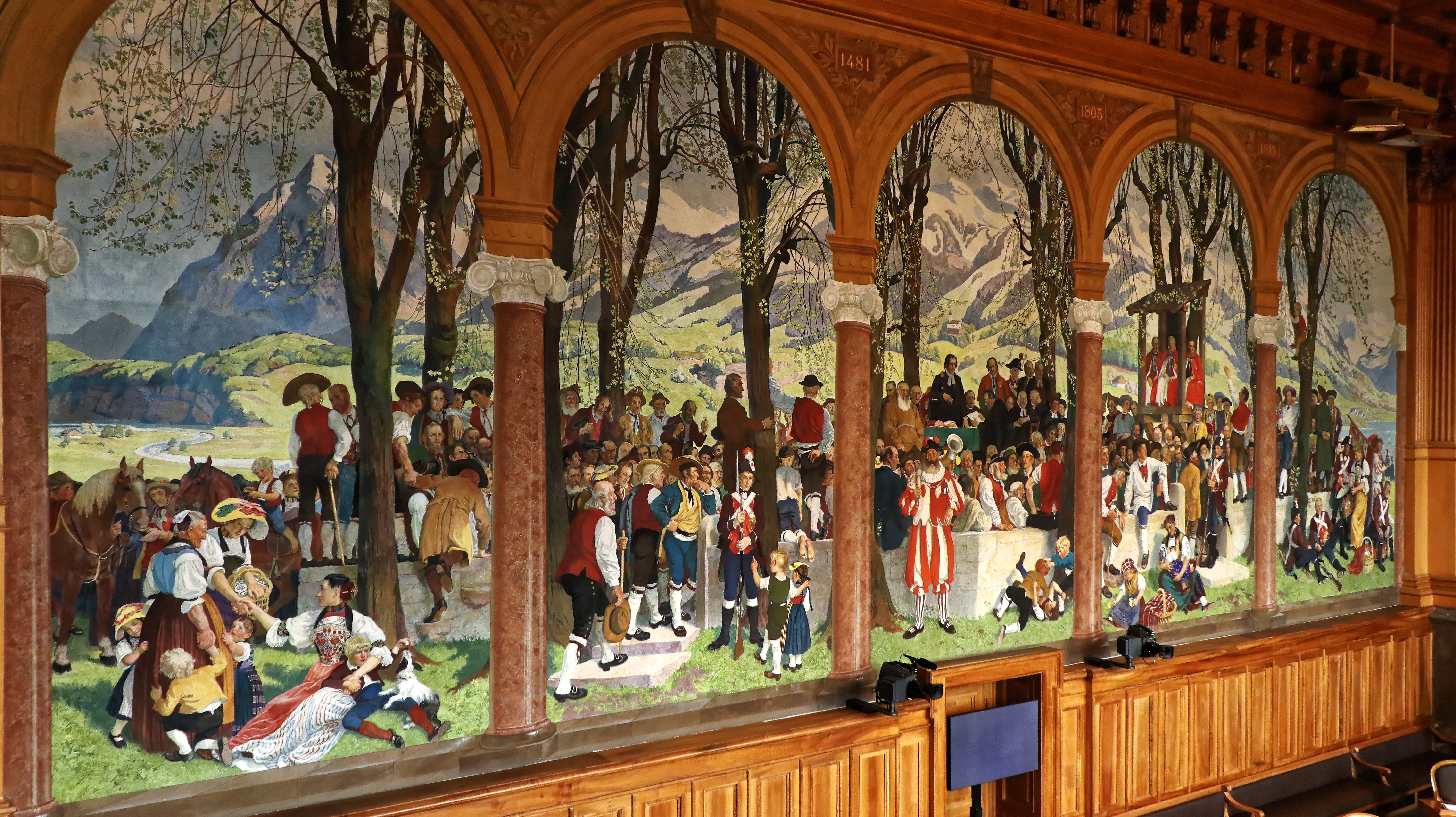 Bilder vom Besuch der Teilnehmer des WikiAlpenforums (WAF) am 2. Juni 2018 im Bundeshaus in Bern